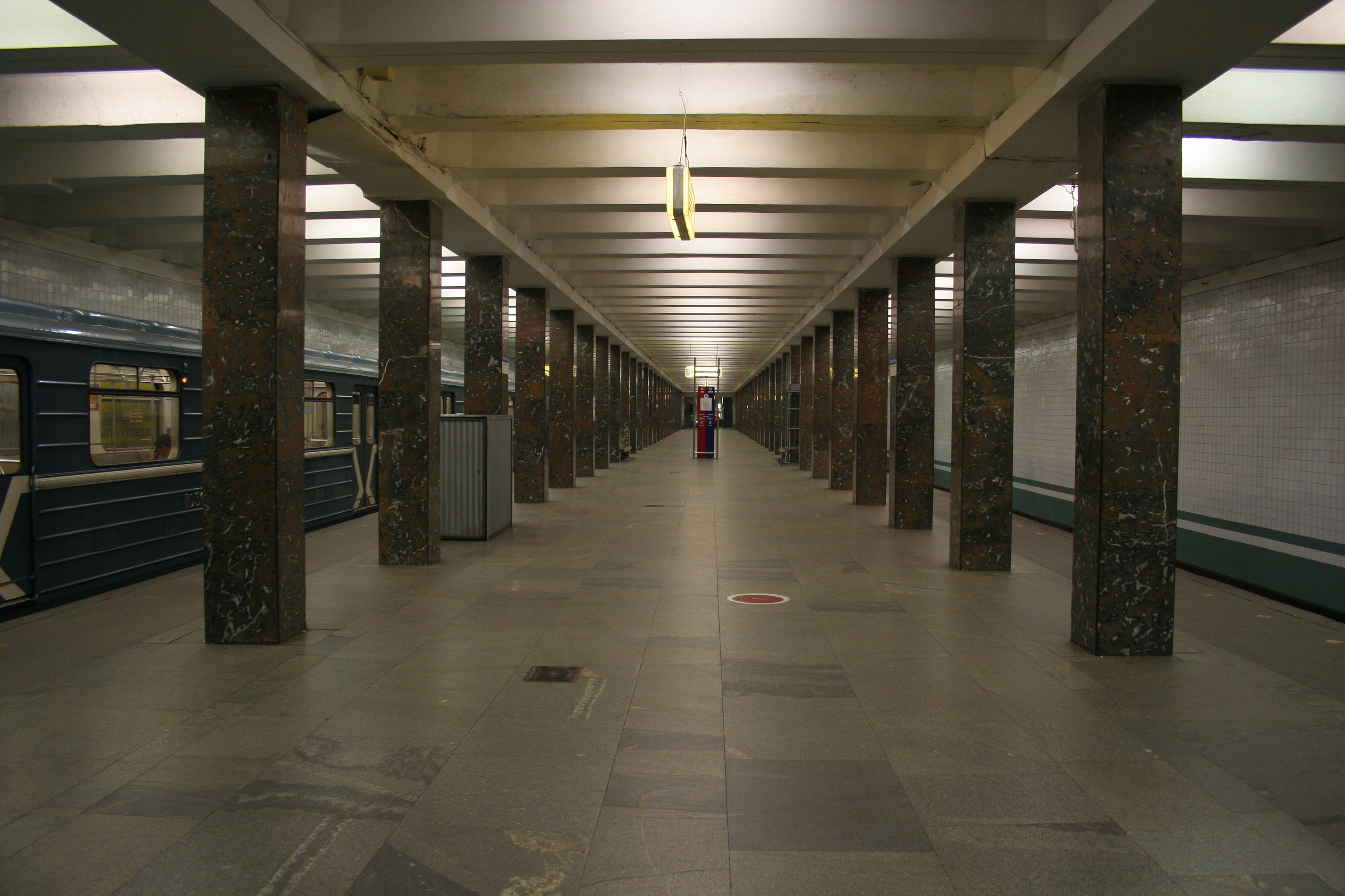 U-Bahnhof Retschnoi Woksal der Metro Moskau.